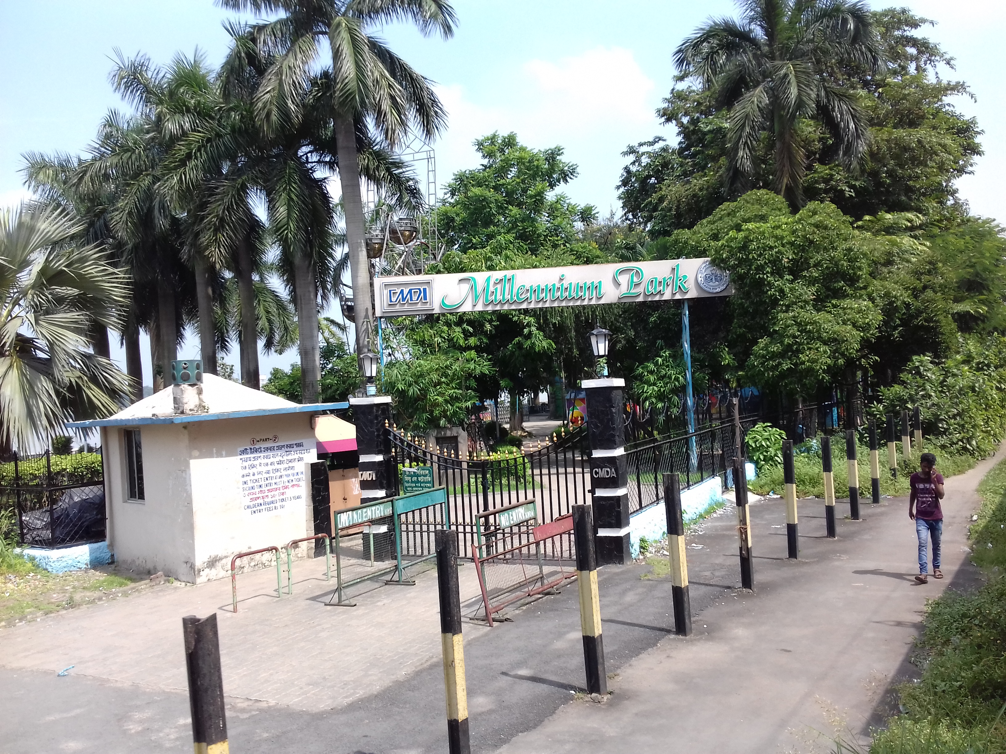 কলকাতা মিলিনিয়াম পার্ক। এই পার্ক বা উদ্যানটি হুগলী নদীর পূর্ব তীরে কলকাতা শহরে অবস্থিত।